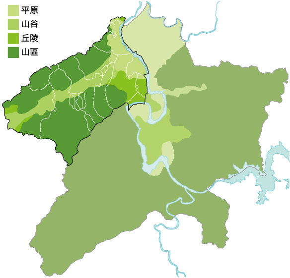 中文（台灣）: 新店／安坑地區地形圖。